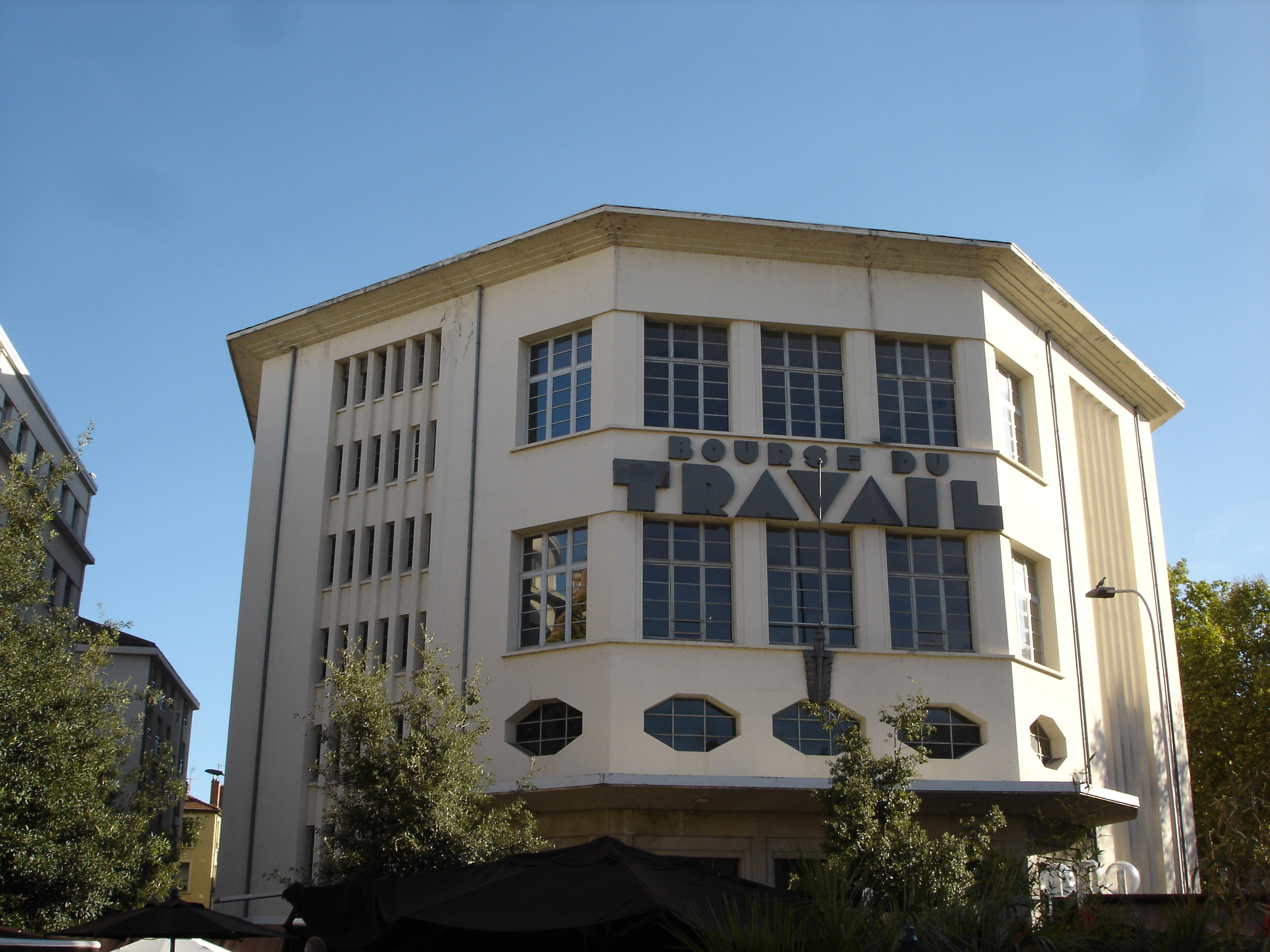 Façade Nord de la Bourse du travail dans le 3 ème arrondissement de Lyon, en France.